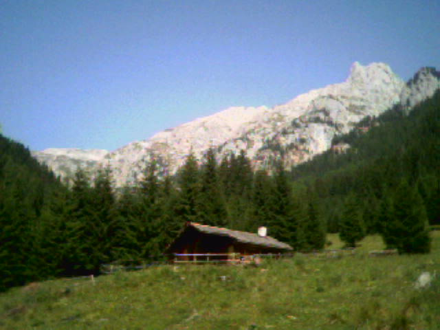 Baito/Bivacco Valsorda alle pendici del Latemar